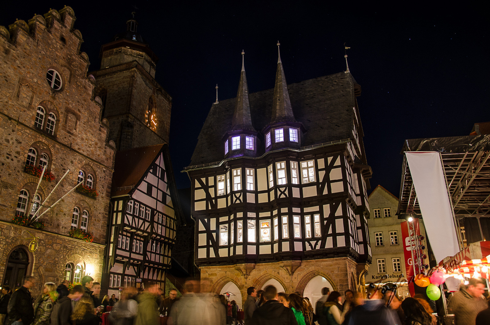 Raadhuis Alsfeld in de nacht